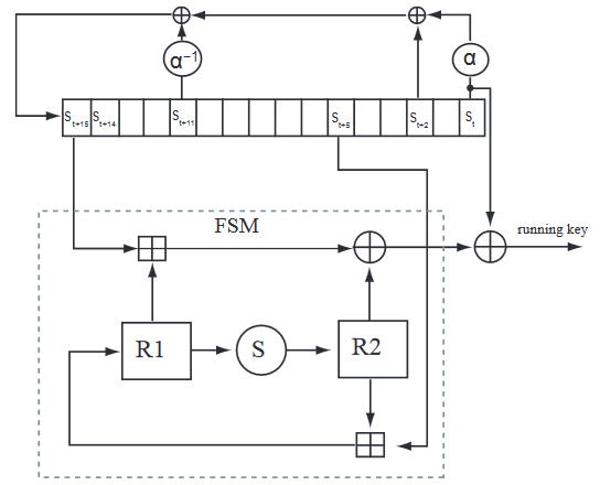 Схематическое изображение алгоритма SNOW версии 2.0